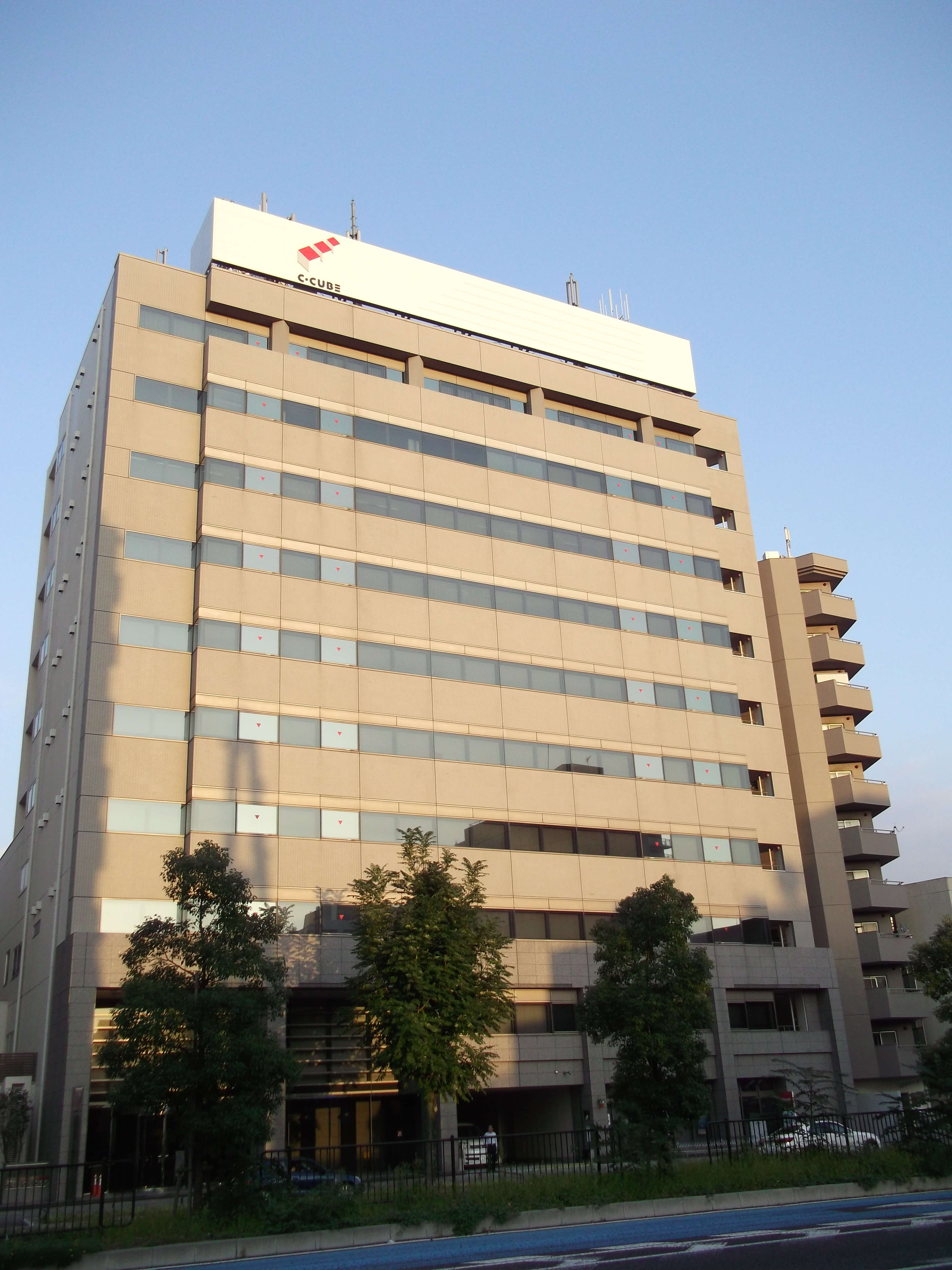 名古屋市中区門前町のシーキューブ本社を西側公道より撮影